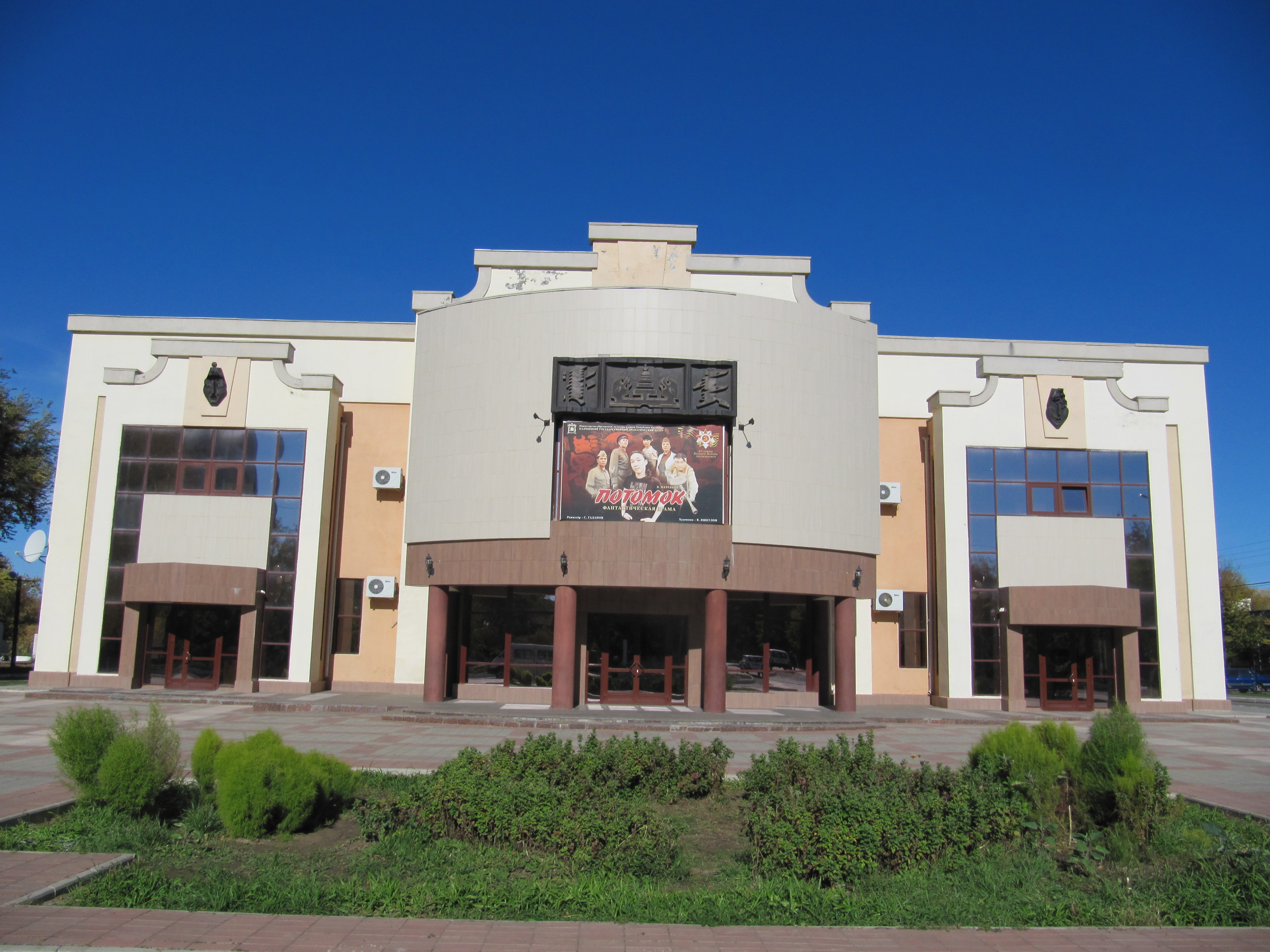 Калмыцкий драматический театр имени Баатра Басангова, Элиста, Калмыкия